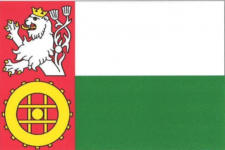 vlajka, Rovná, okres Sokolov